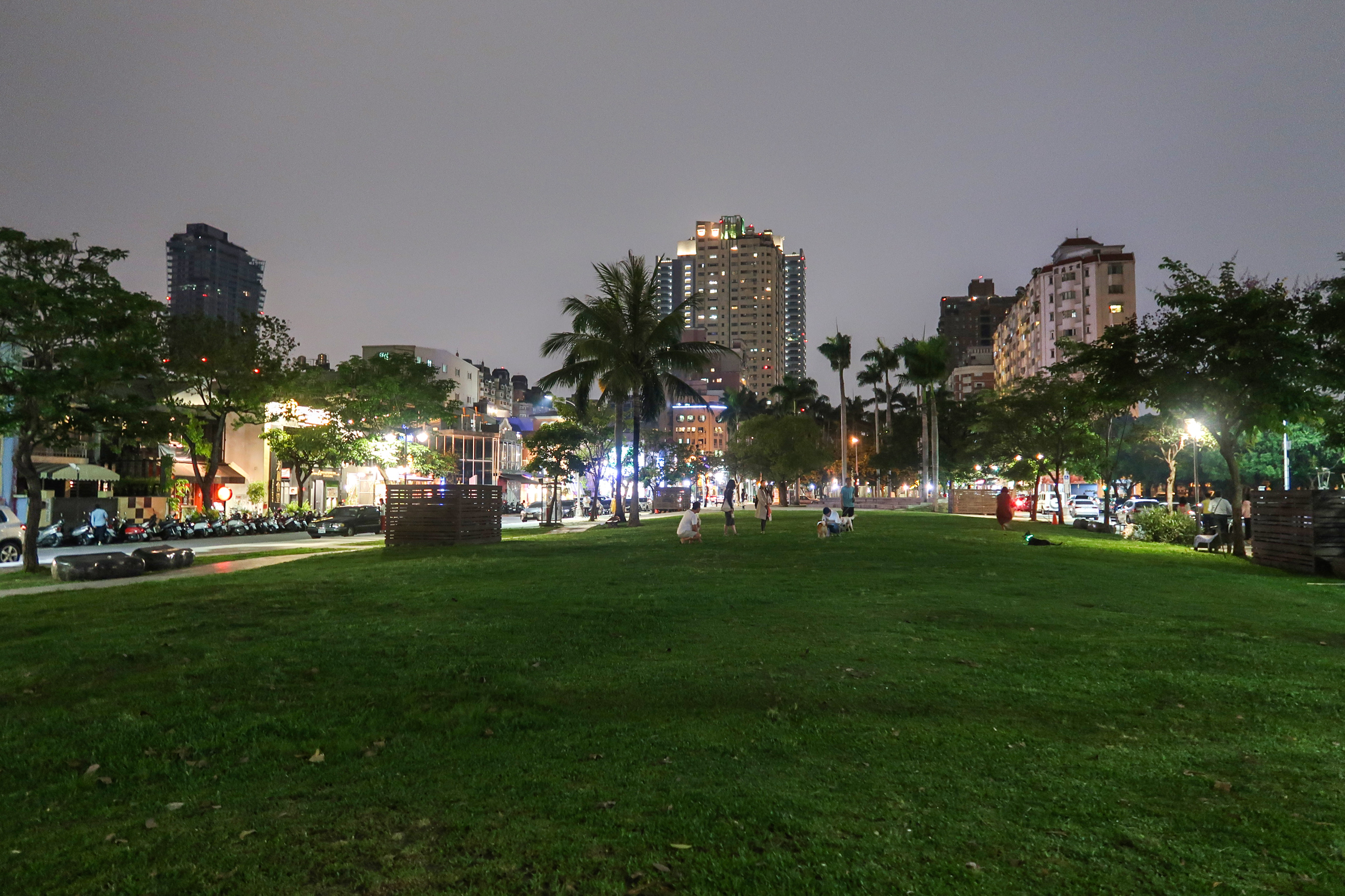 Art Garden Taichung Night view